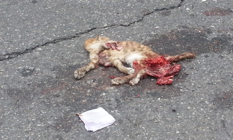 고양이 로드킬 2